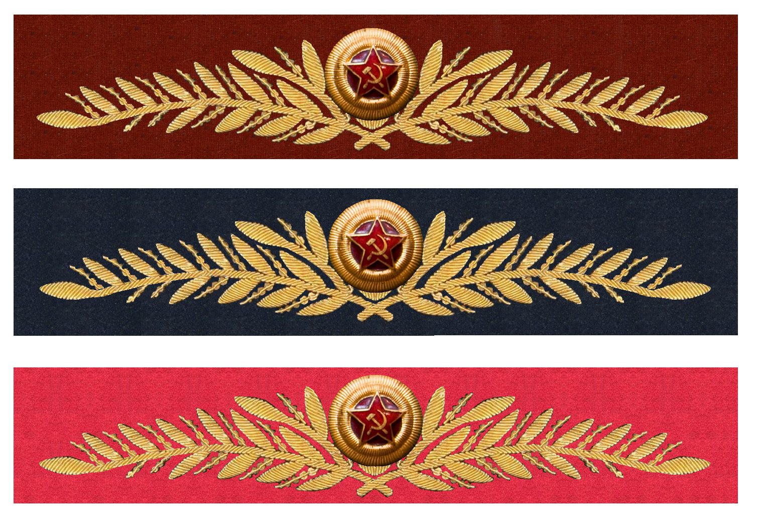 Шитье ген нквд